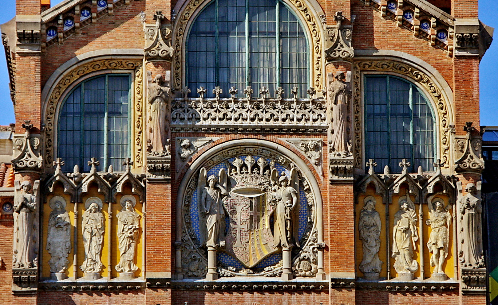 Grup iconogràfic del segon pis de l'edifici d'administració (detall) de l'Hospital de Sant Pau (Barcelona, Catalunya) (1902-1911)